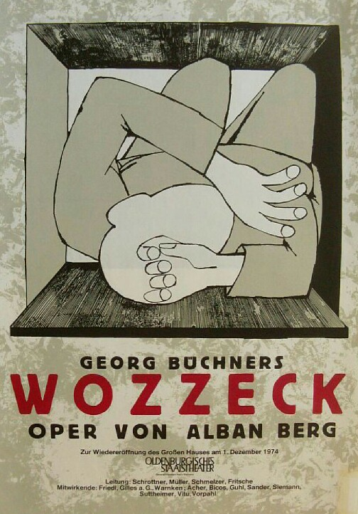 Oldenburg